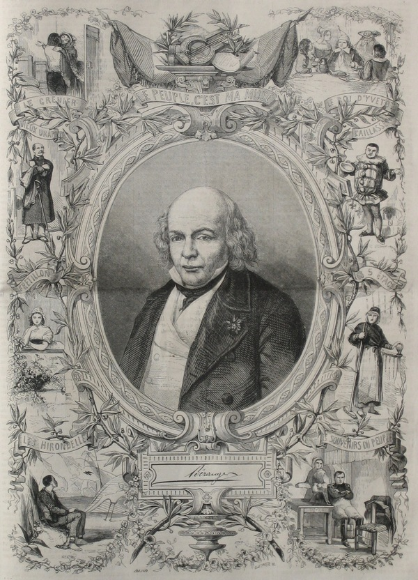 Portrait du chansonnier Béranger